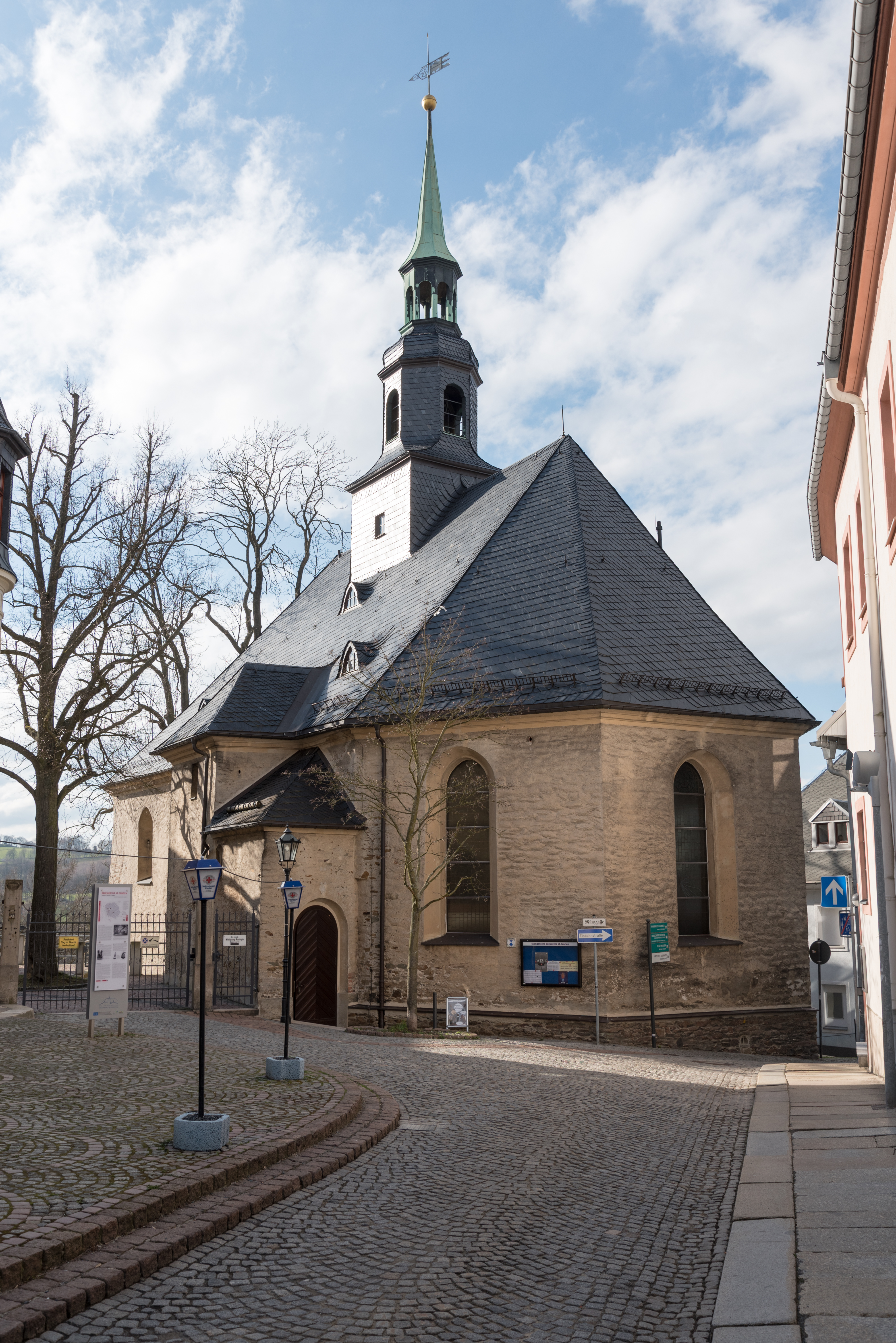 Annaberg, Bergkiche St. Marien